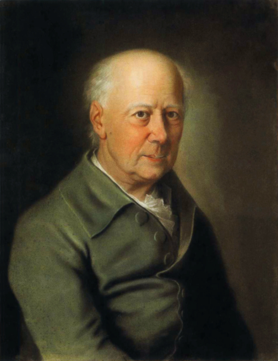 Adam Friedrich Oeser,Rückseite: "Oeser, / gemalt für Gleim / von / Lauer / 1798".